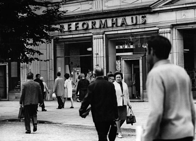 Berlin, Karl-Marx-Allee, Reformhaus Zentralbild Häßler 28-8-69 Berlin: Ein äußerst vielseitiges Sortimentsangebot steht den Kunden des Reformhauses in der Berliner Karl-Marx-Allee zur Verfügung.